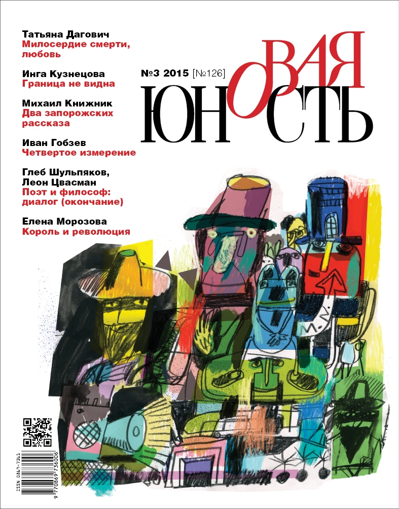 Обложка журнала «Новая Юность» № 3, 2015